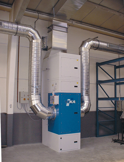 Stationäre Schweißrauchabsaugung, Zentralabsaugung